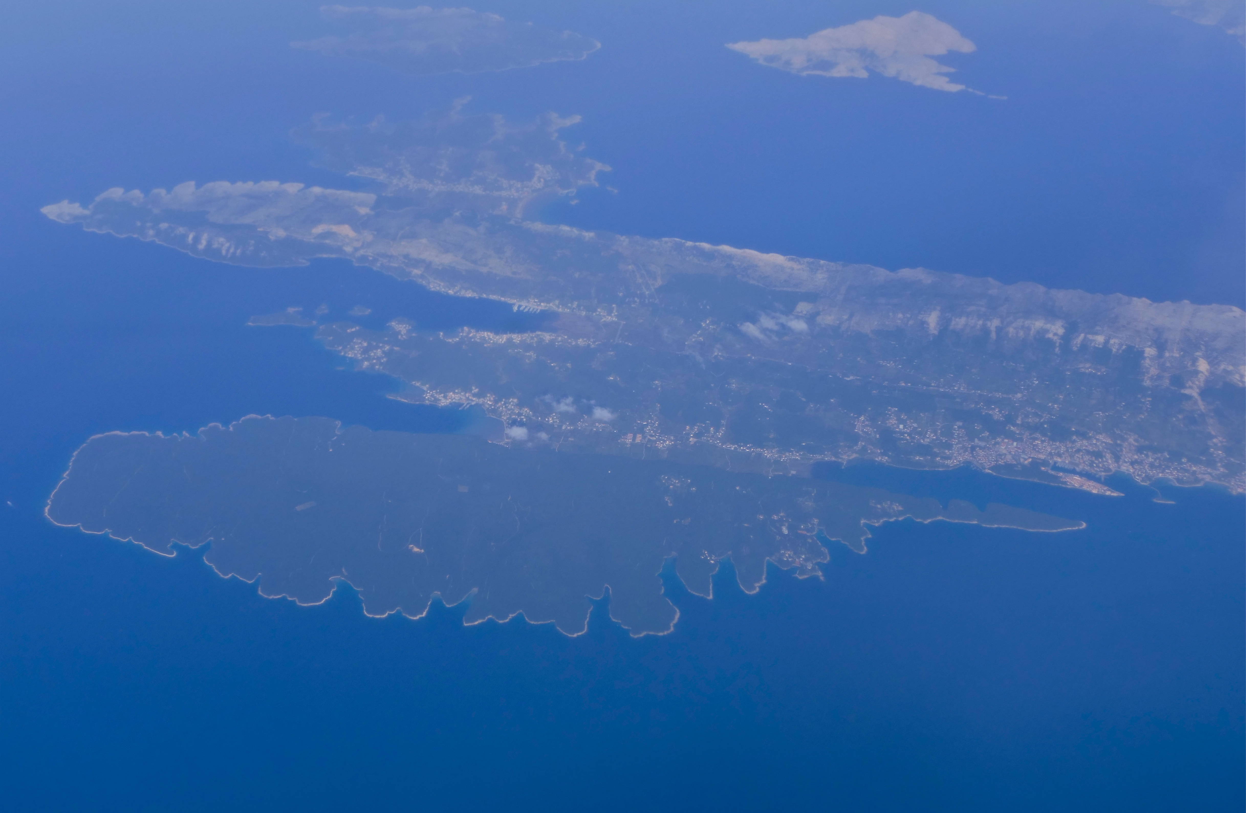 Dalmatia, CROATIA